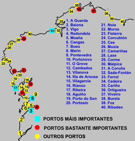 self made